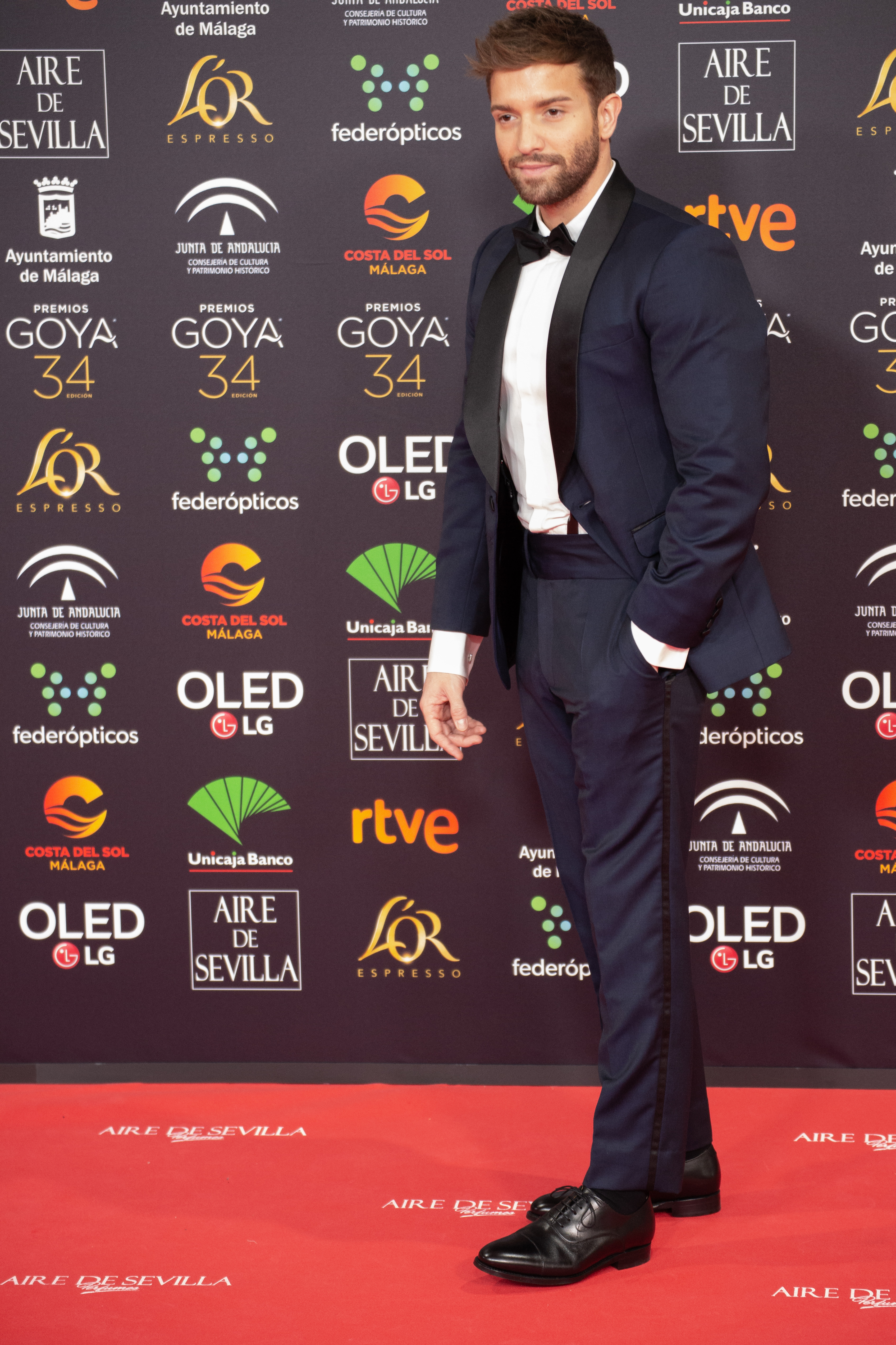 Pablo Alborán en la alfombra roja de la ceremonia de entrega de los Premios Goya 2020 celebrada en Málaga